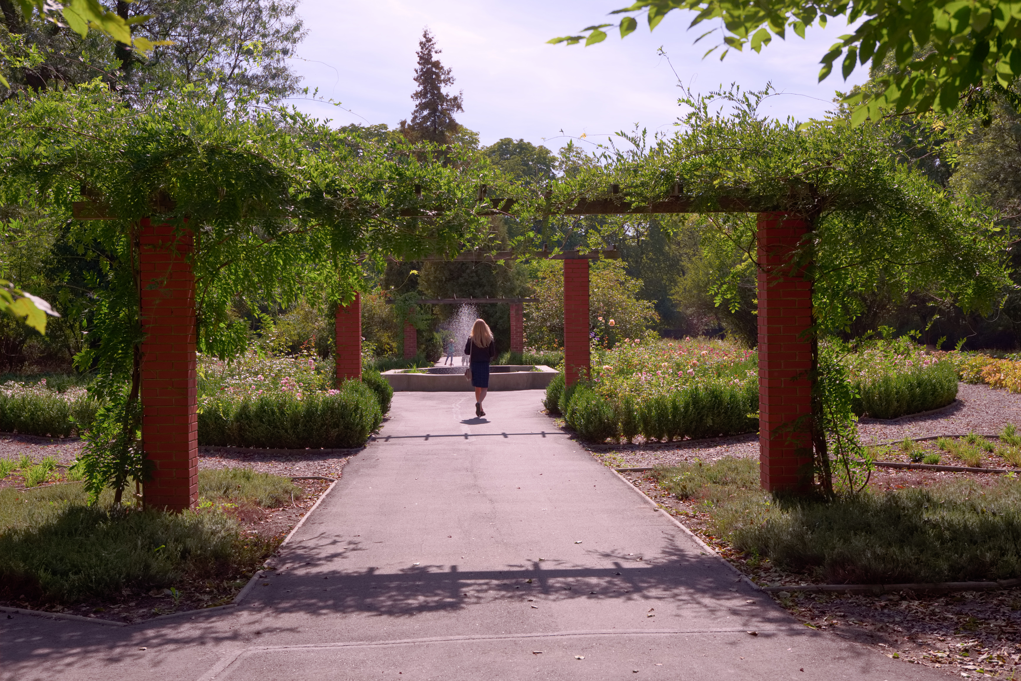 Park miejski im. ks. J. Poniatowskiego (1916-1927) - Piotrków Trybunalski. Obiekt wpisany do rejestru zabytków pod nr 373